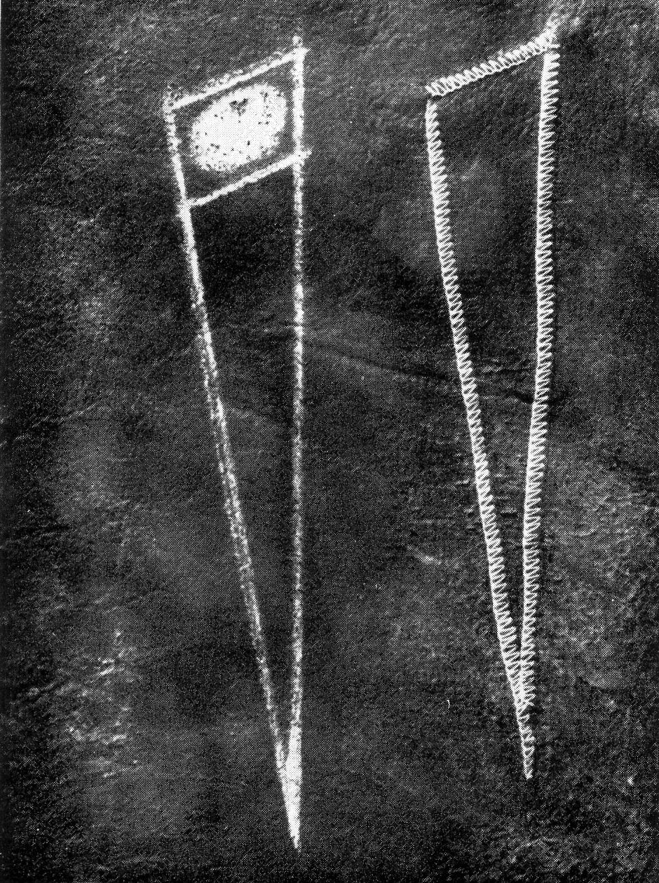 Nähte in der Kürschnerei: Absatz „Anbrachen“, Bildunterschrift „Einfachzunge“.